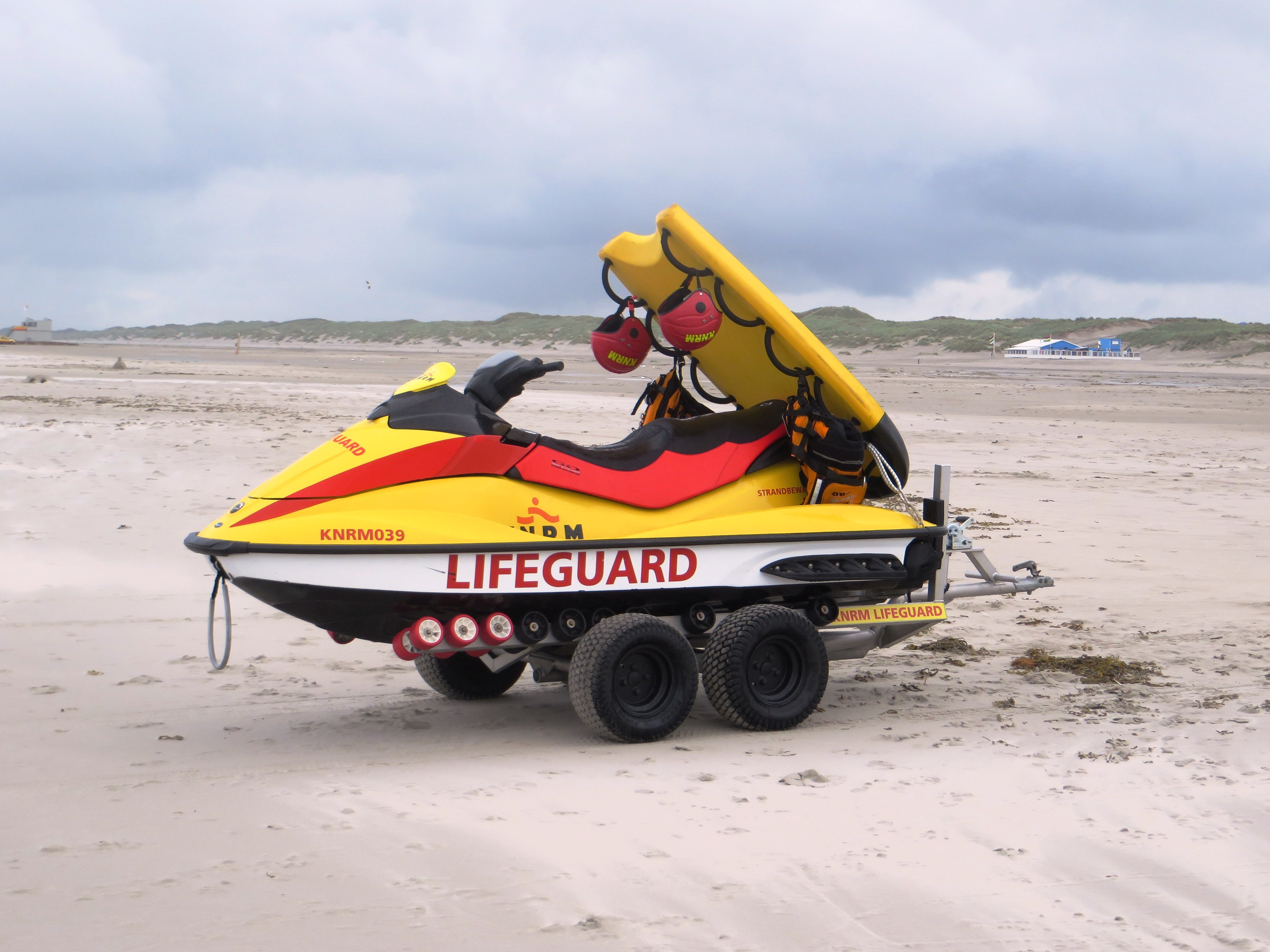 KNRM boot op Terschelling